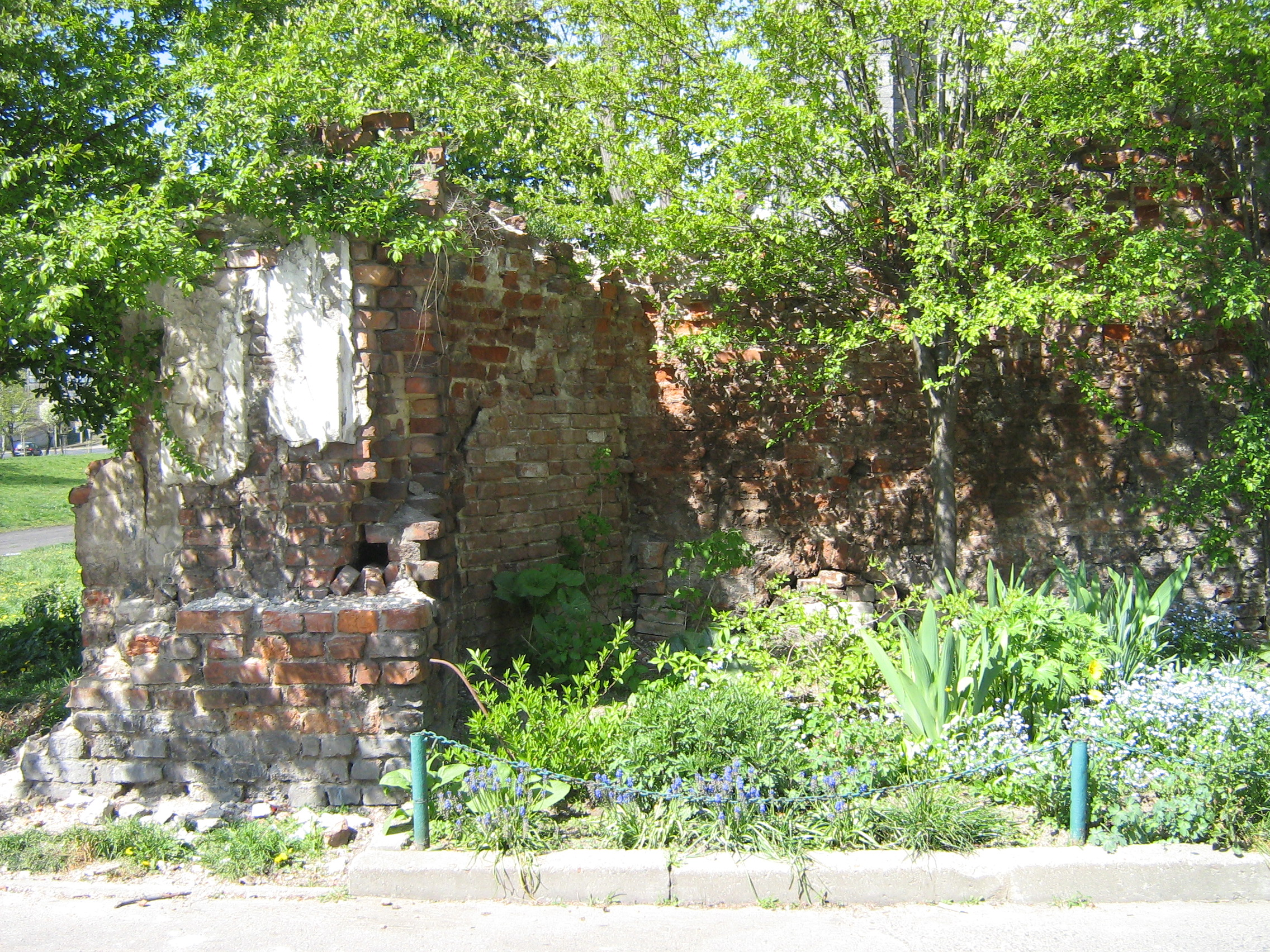 Ruiny Bramy Żabiej w Gdańsku.